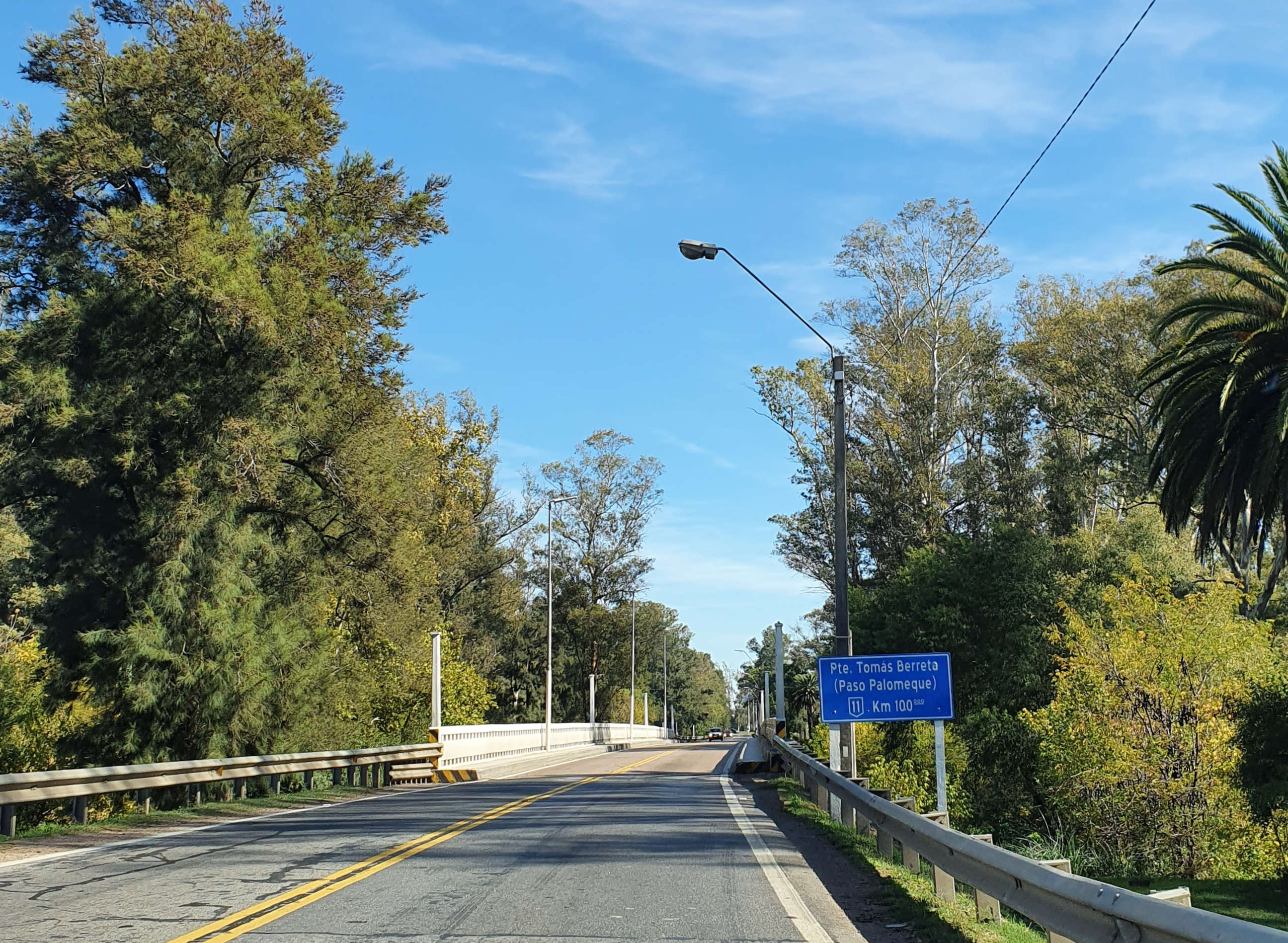 Ruta 11 km 100, departamento de Canelones, Uruguay